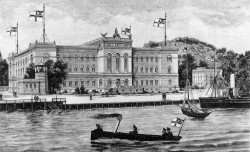 Das heutige Landeshaus in Schleswig-Holstein als Marineakademie, Zeichnung von Fritz Stoltenberg